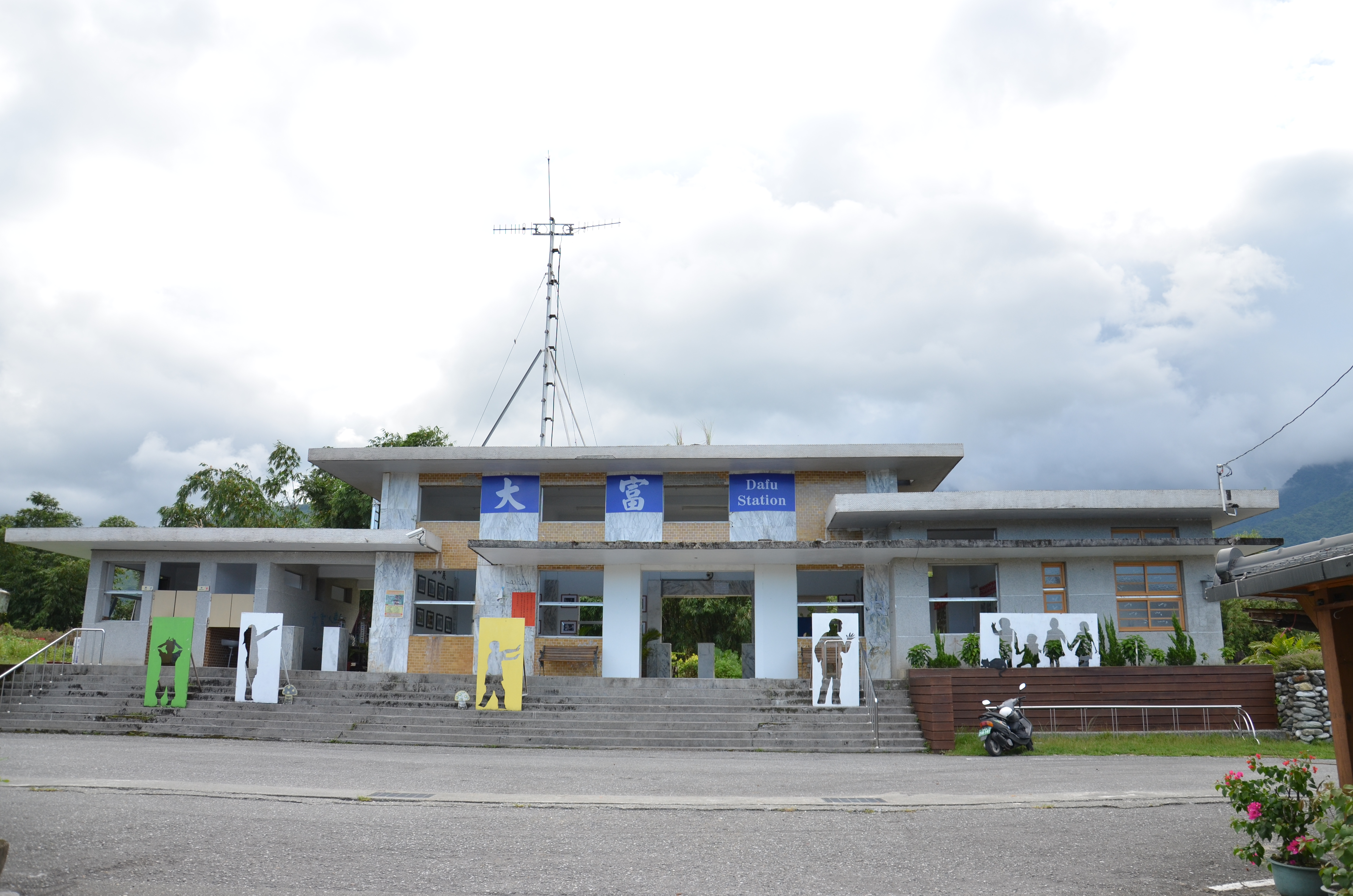 中文（台灣）: 大富車站-站體正面